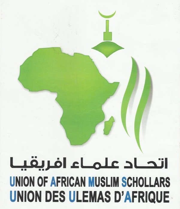 Kiswahili: Alama ya Shirikisho